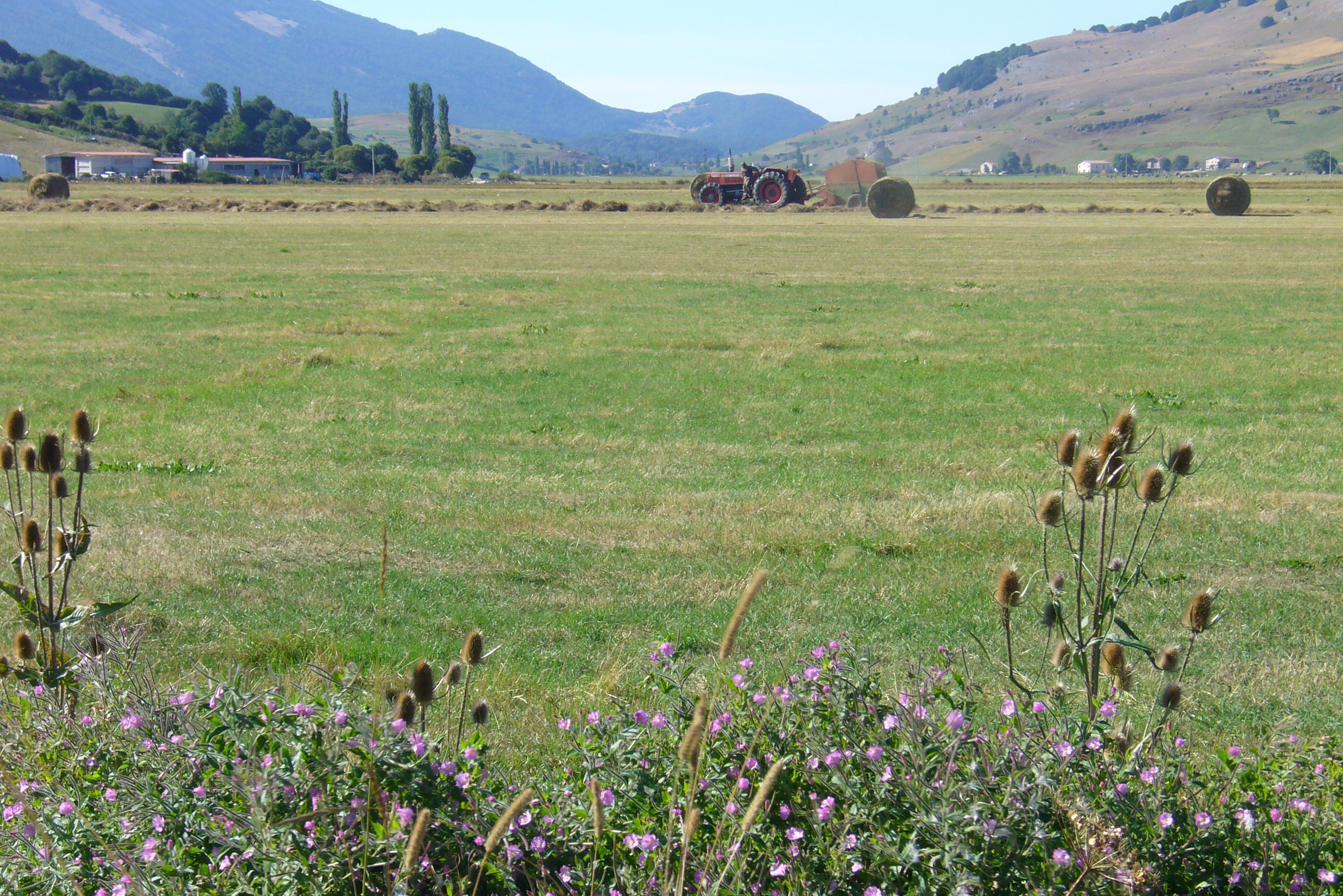 Piana delle 5 Miglia e Alto Aventino